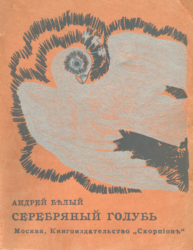 Обложка первого издания романа "Серебряный голубь" (1910)